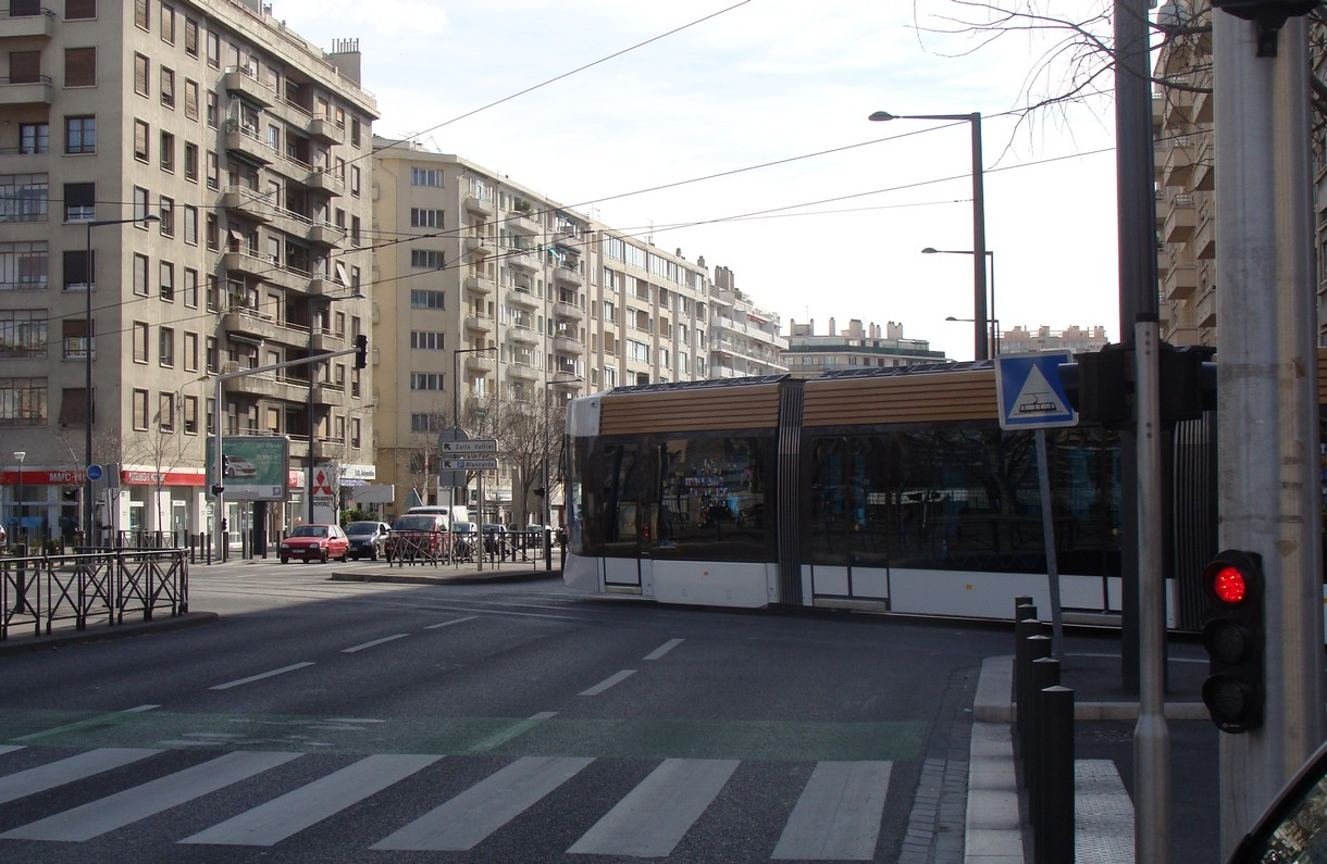 Un tram de la ligne 1 traverse la "rocade du Jarret" (carrefour avenus Foch / boulevard Françoise-Duparc).